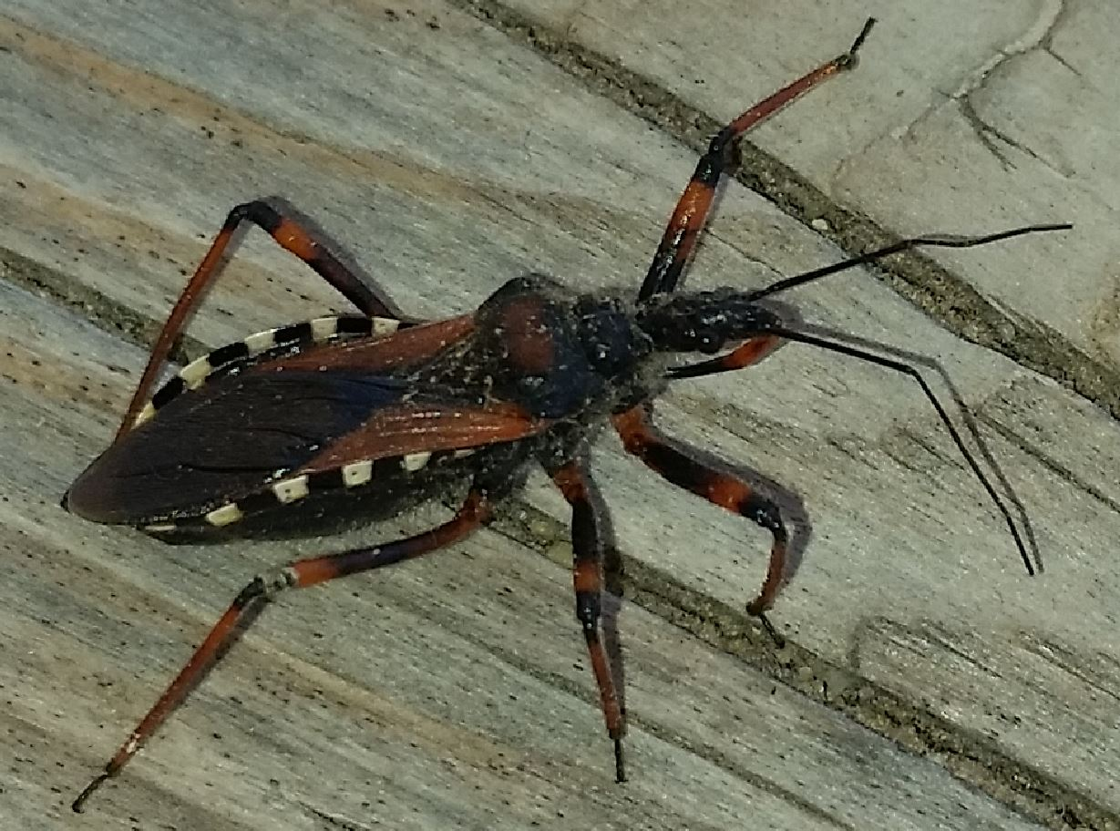 Raubwanze Rhynocoris cuspidatus, am 20.6.2016 an der Côte d’Azur